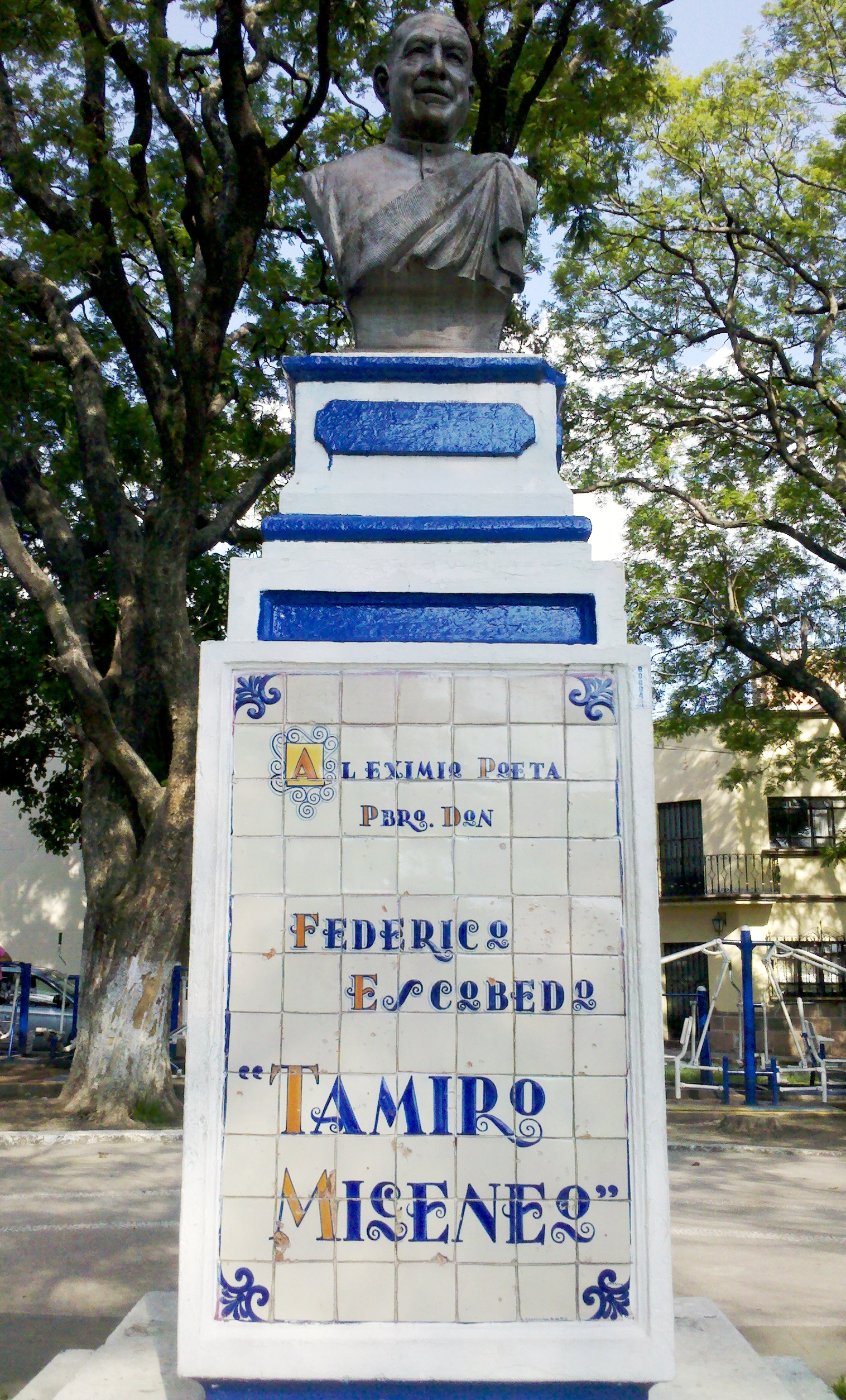 Monumento a Federico Escobedo, Puebla, México. Jardín Federico Escobedo, 16 de septiembre entre 21 oriente y 23 oriente.